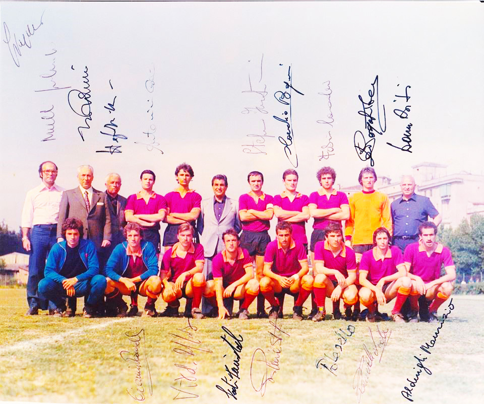 La quadra della Romulea che ha partecipato al campionato di Serie D arrivando secondante girone F. Nella fotografia è presente il presidente Giuseppe Vilella (al centro)